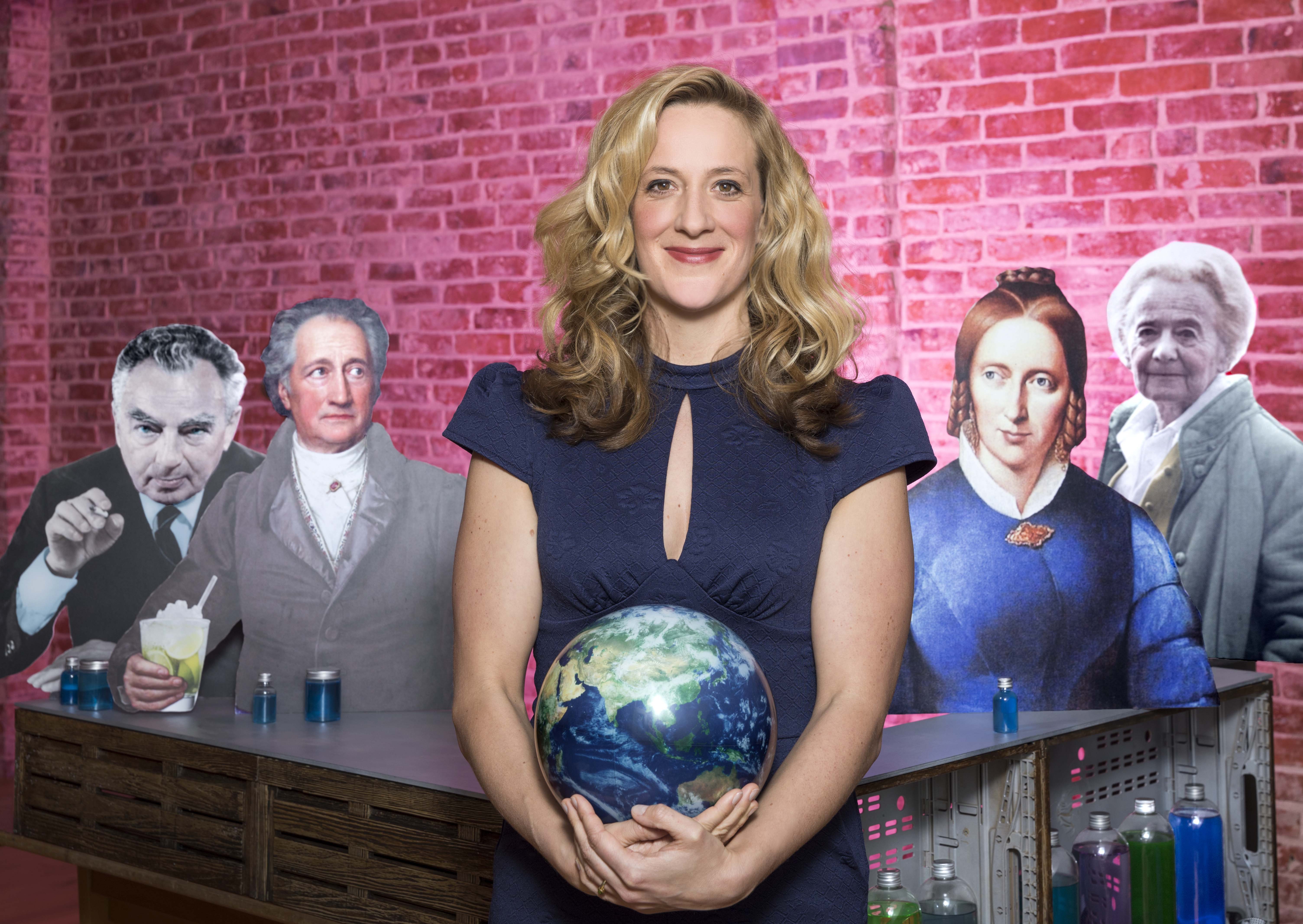 Poesie Kabarett „Dichter dran!" mit Anna Magdalena Bössen